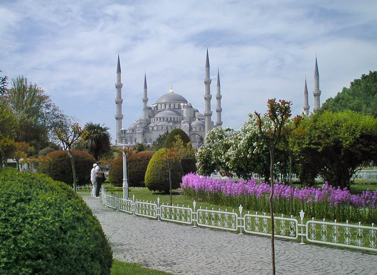 Blue mosque in Istanbul, spring 2002 author T. Moravec Sultan Ahmet Mosque